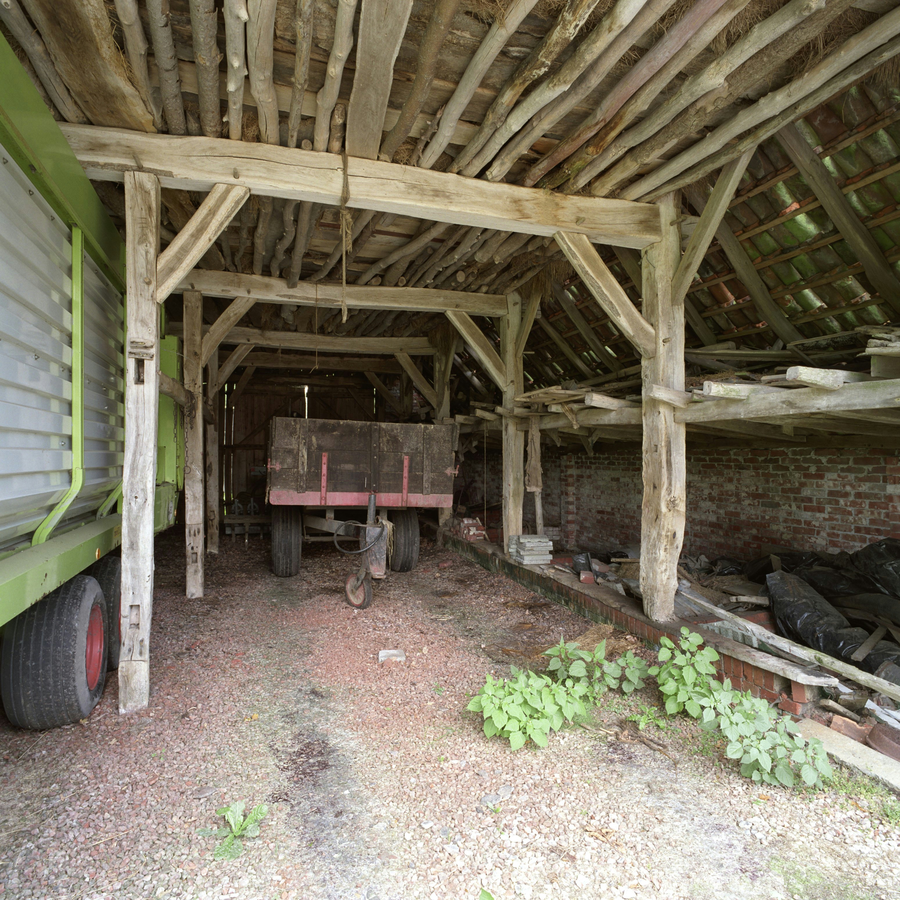 Schuur/ Gebint: Interieur, schuur met gebint